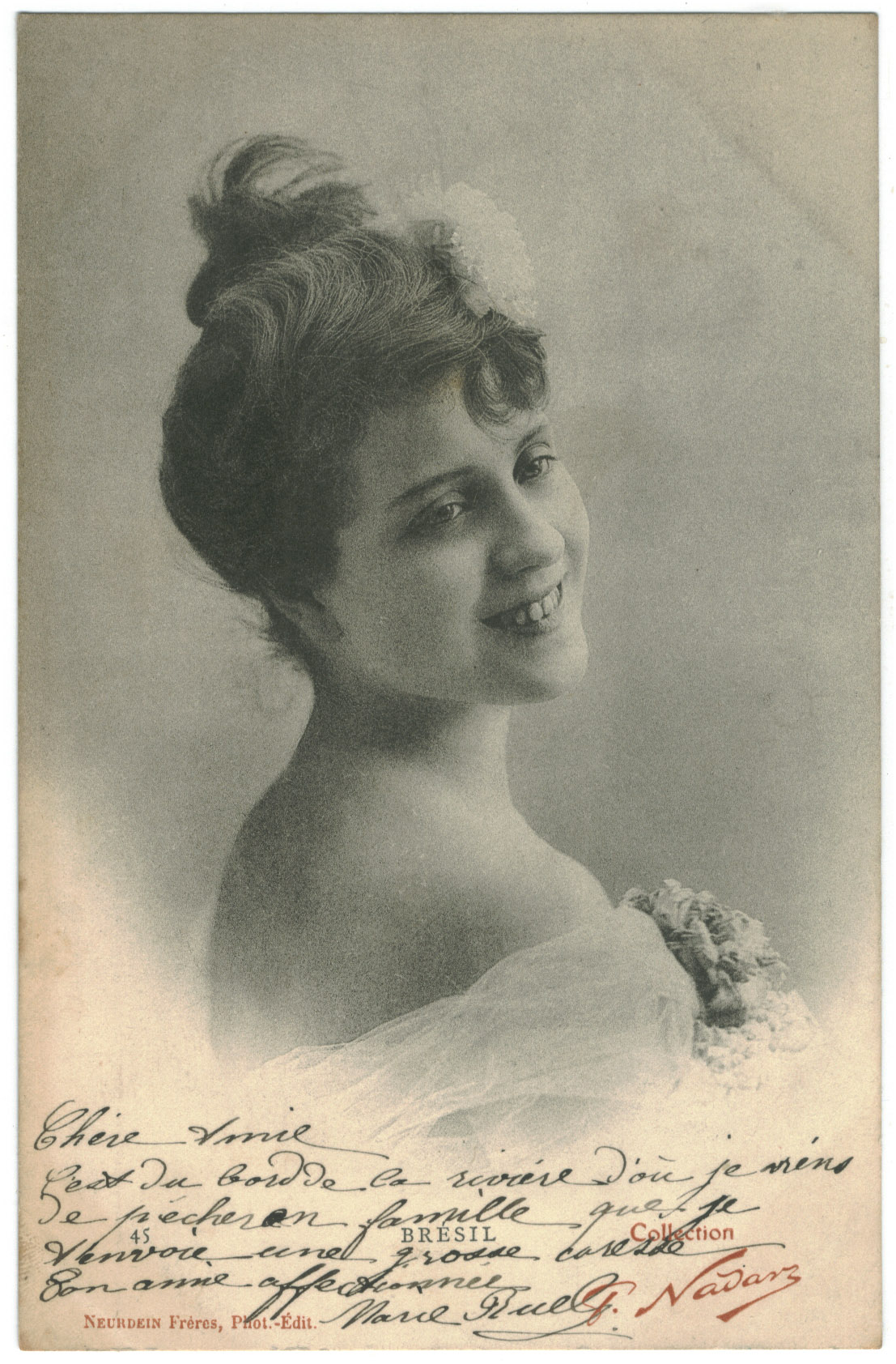 BRÉSIL, Marguerite_Neurdein. Photo Nadar.